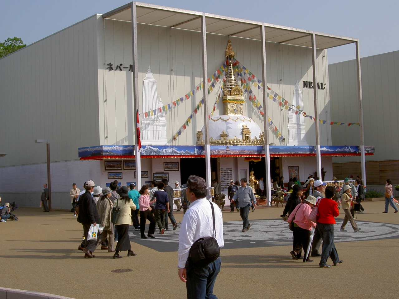 EXPO 2005 Nepal pavilion